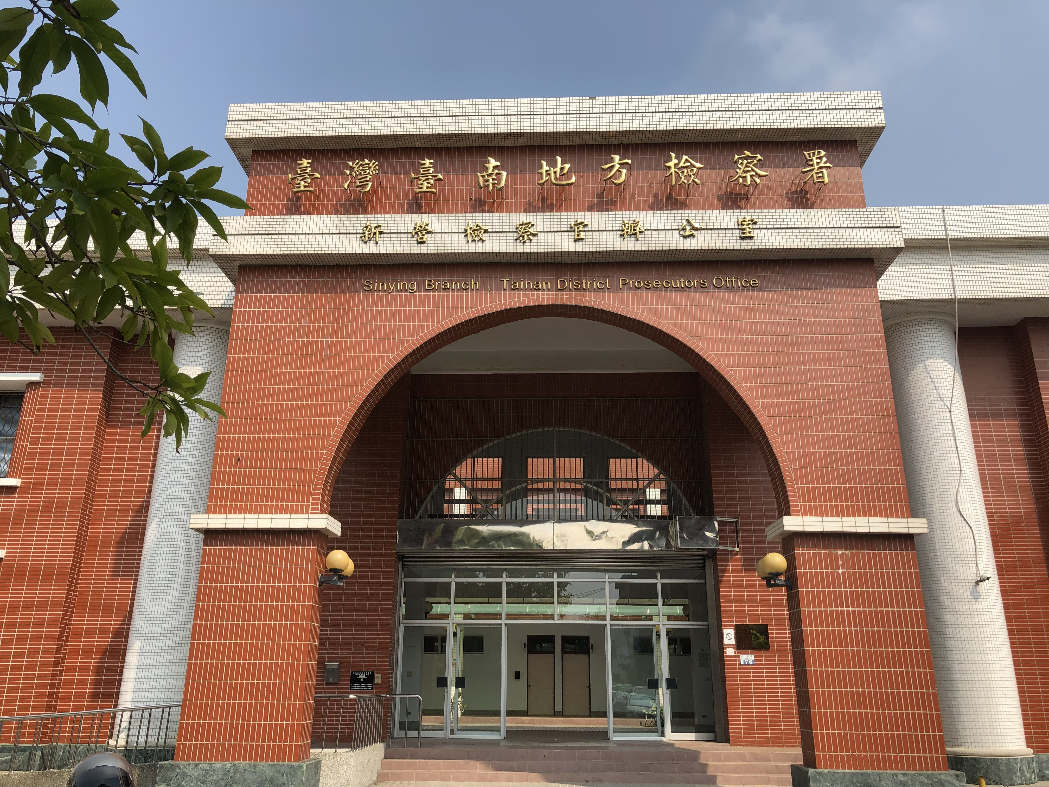 臺灣臺南地方檢察署新營檢察官辦公室。